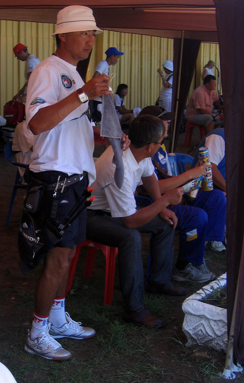 Баир Бадёнов на чемпионате России по стрельбе из лука 2009 года